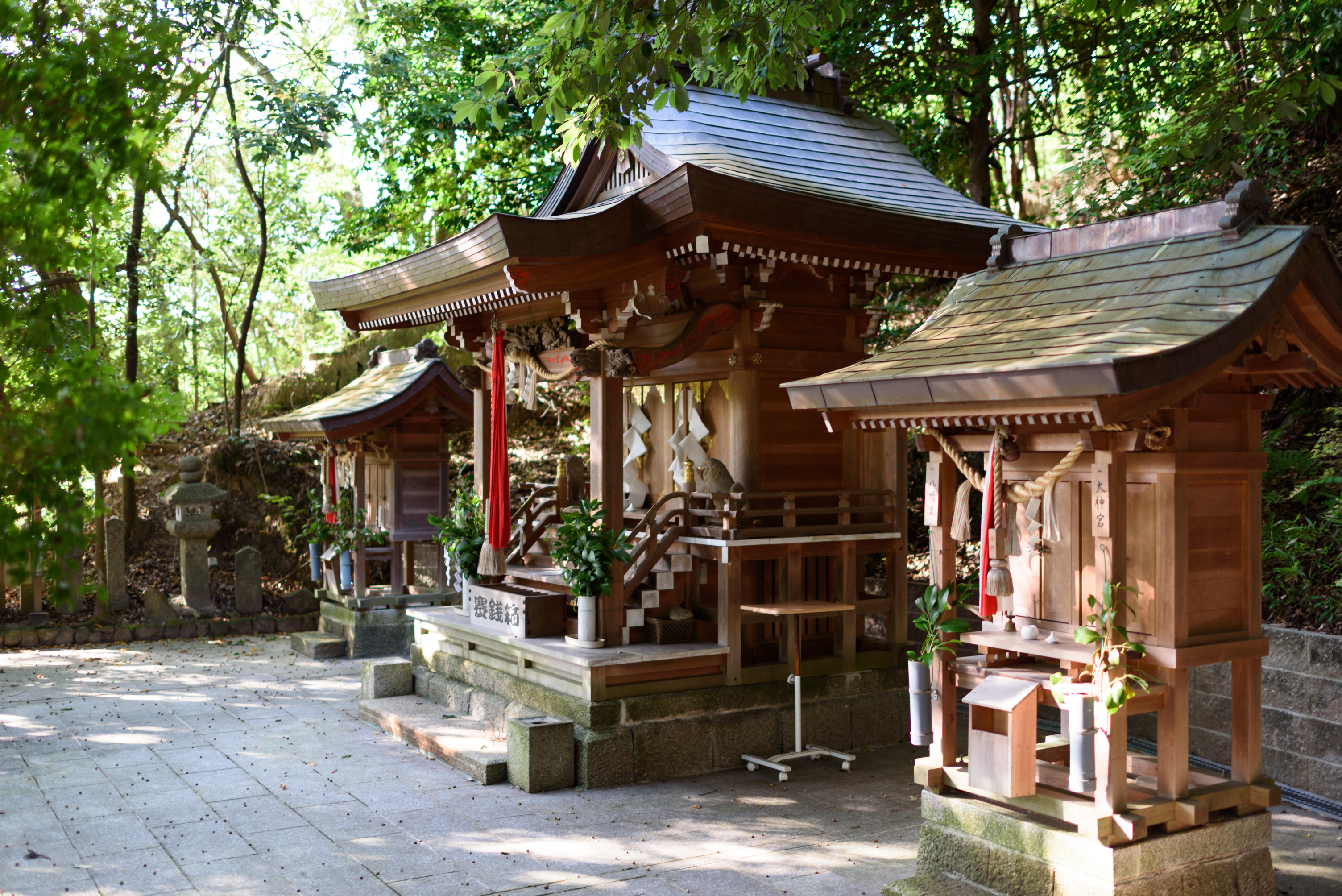 東谷神社（京都府相楽郡精華町柘榴）